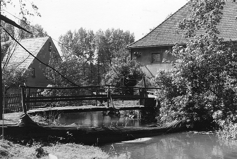 Original image description from the Deutsche Fotothek Kroppen. Ehem. Mühle, Ansicht mit Steg